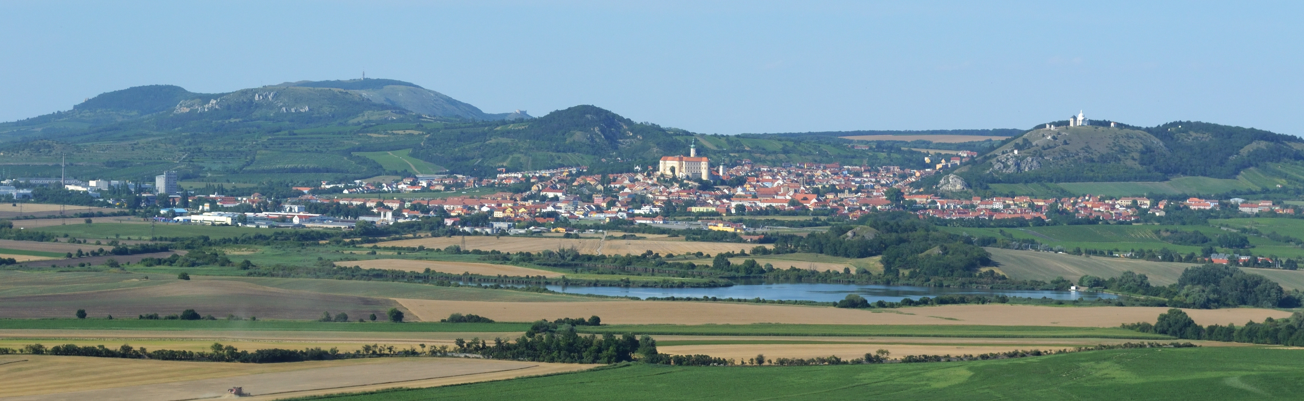 Mikulov - pohled z vrchu Kreuzberg u obce Kleinschweinbarth.